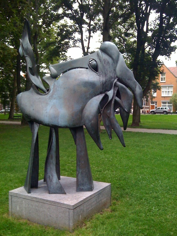 Statue Gaia 1998 Wilhelminapark Utrecht Fons Bemelmans